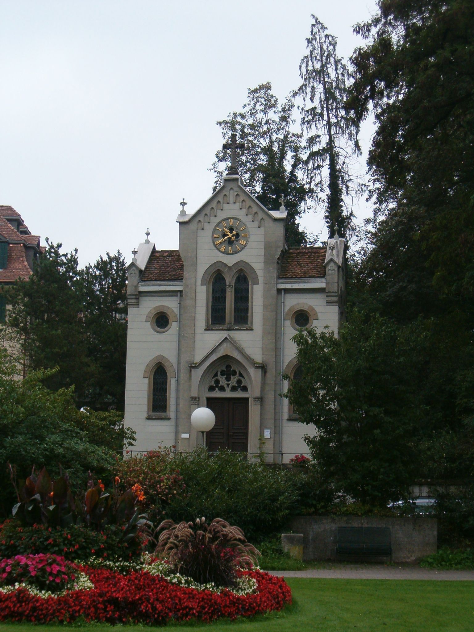 Bäderviertel Baden, Dreikönigskapelle